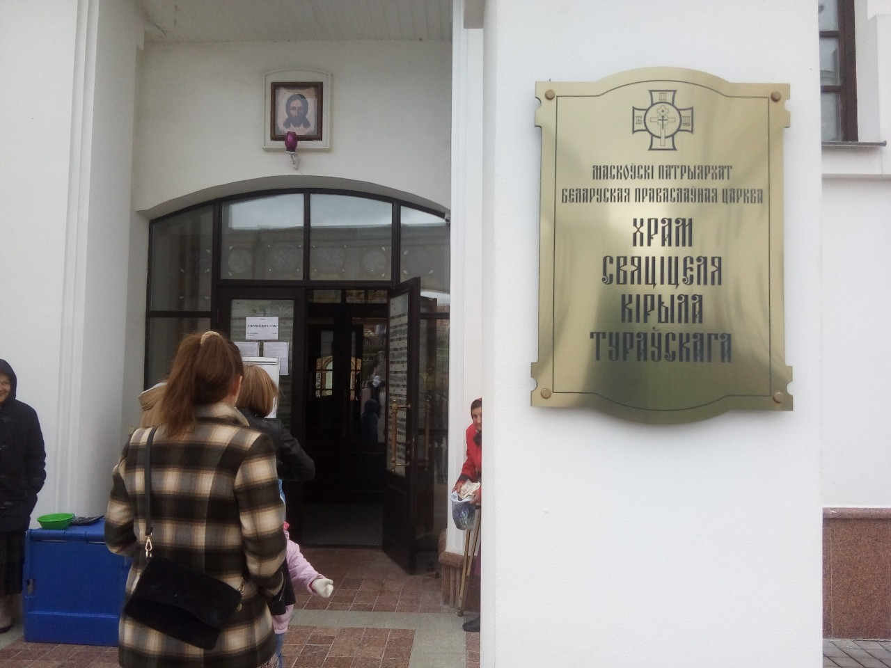 Беларуская (тарашкевіца): Уваход у храм Кірылы Тураўскага (Менск, Цэнтральны раён, вул. Кірылы і Мятода, д. 3; 22 верасьня 2019 г.)